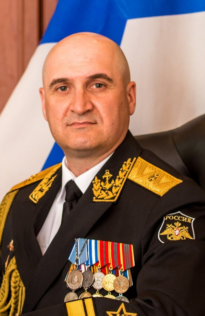 Начальник штаба – первый заместитель командующего Тихоокеанским флотом контр-адмирал Осипов Игорь Владимирович